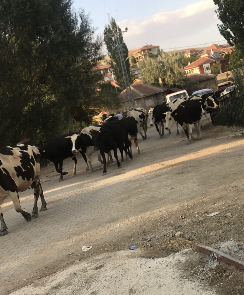 Koeien in het centrum van het dorp Şerefligökgöz, district Haymana, provincie Ankara, Turkije